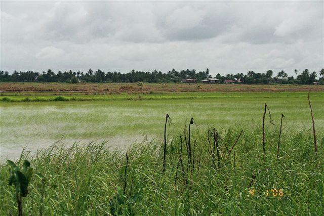 prive foto